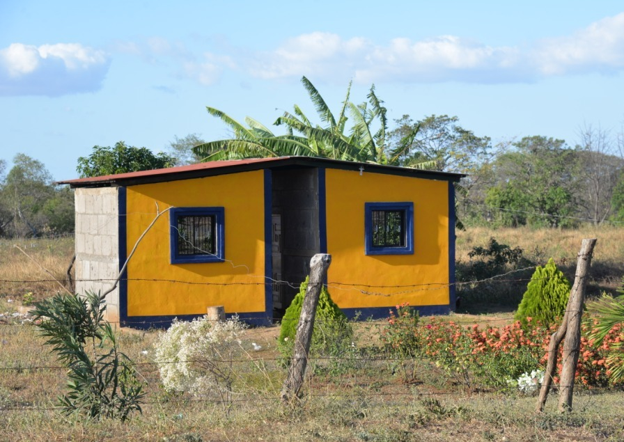 Casa de campo en el municipio de Tisma, entre Tisma y Zambrano.